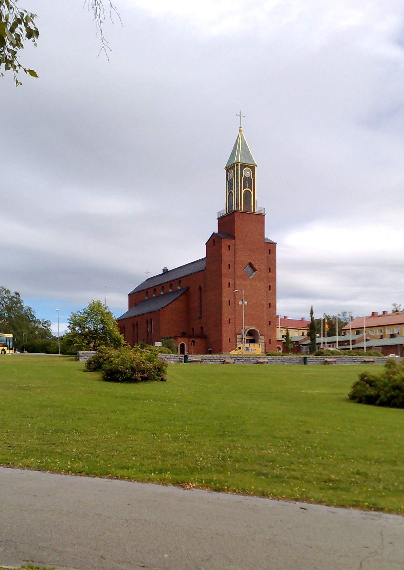 Stora kyrkan i Östersund tagit från Österängsparken